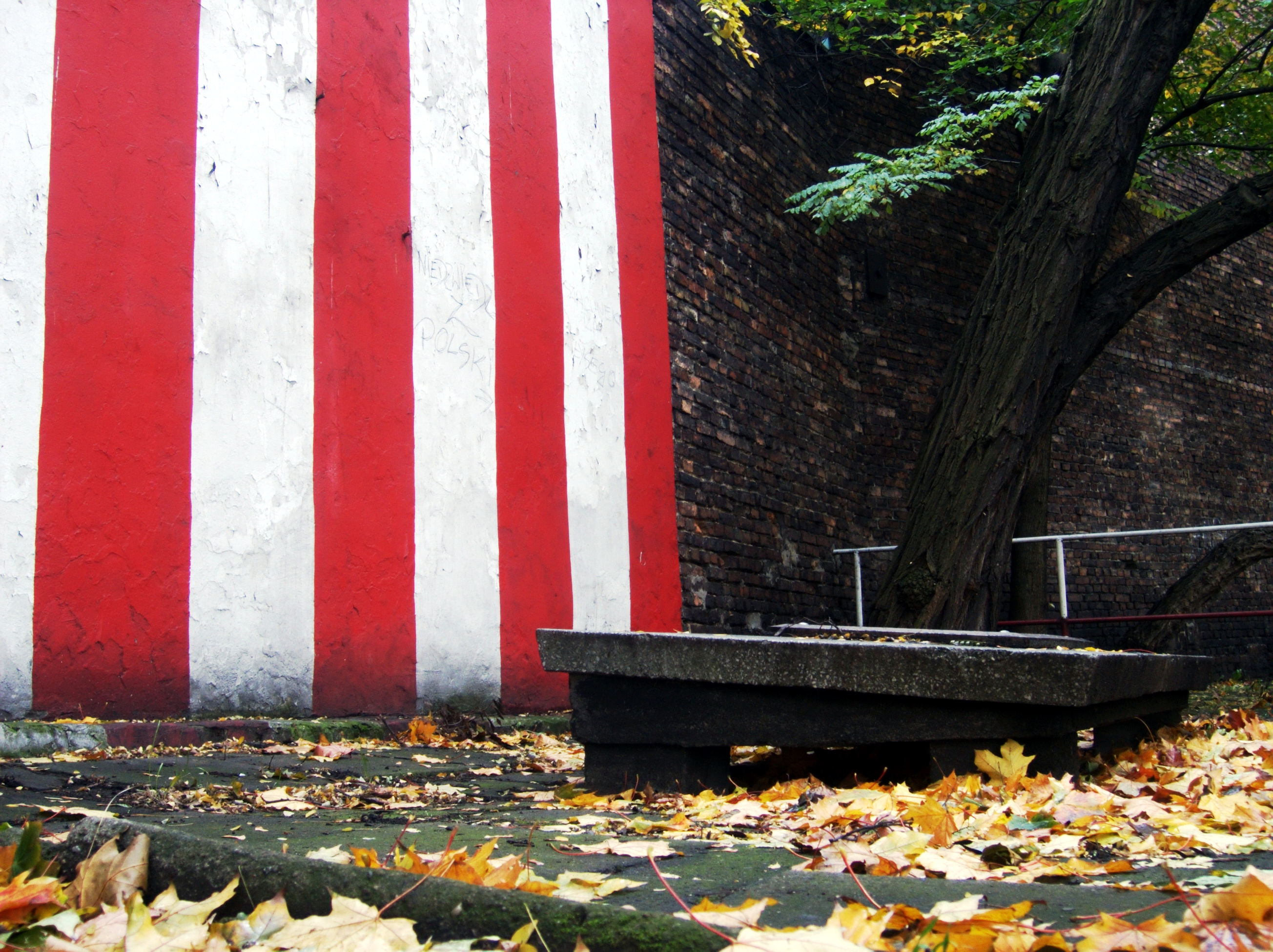 Płyta upamiętniająca hitlerowski mord na członkach GL-PSS w 1 lipca 1944, znajduje się w Sosnowcu Pogini